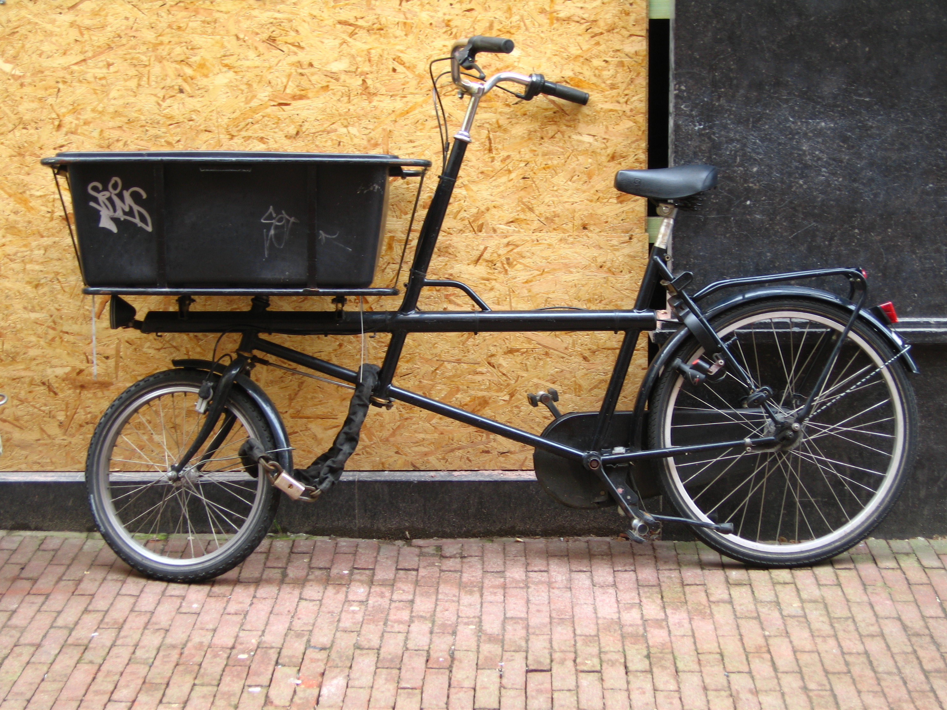 Freight bicycle in Amsterdam, Holland.